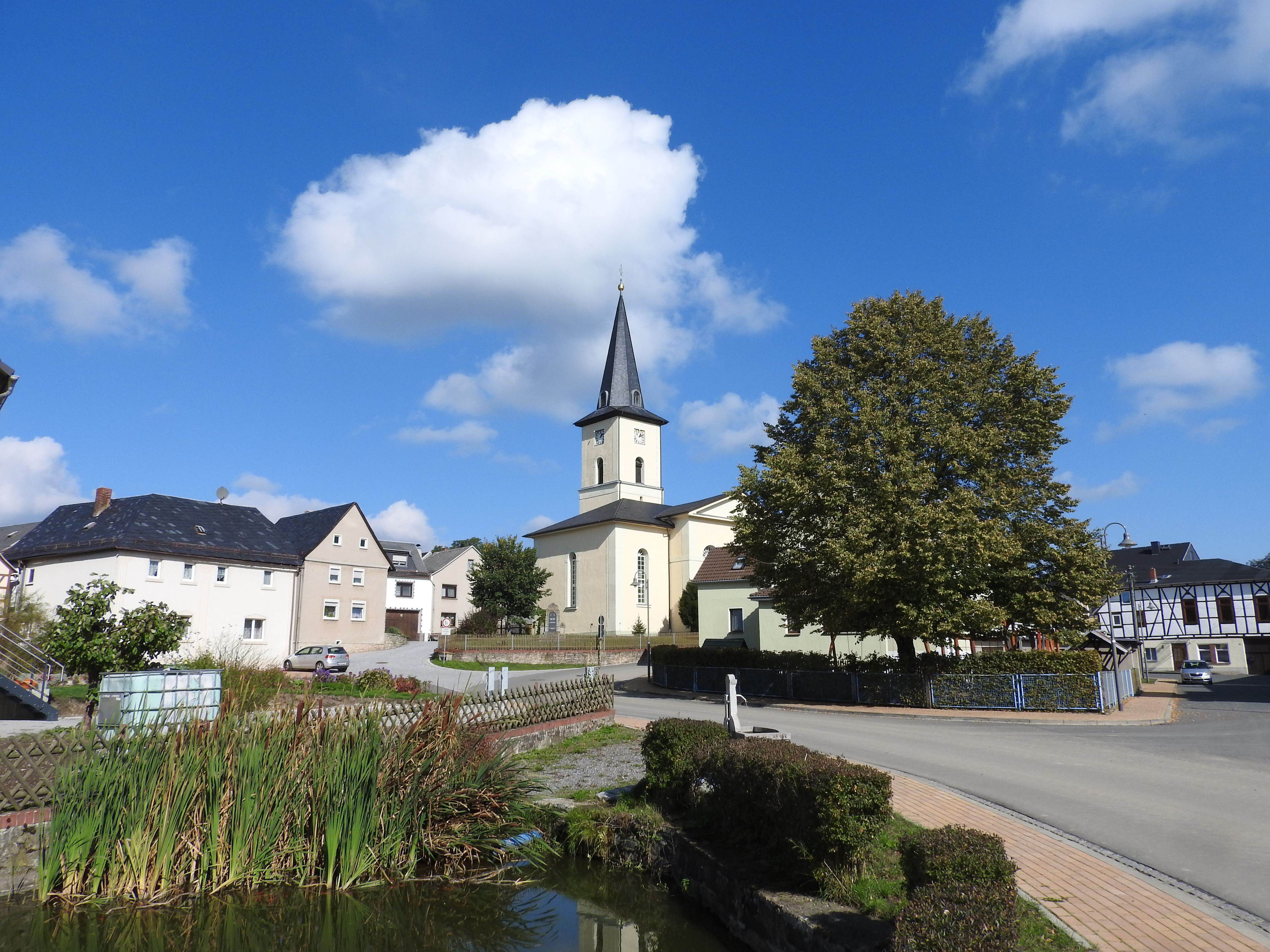 Pörmitz in Thüringen